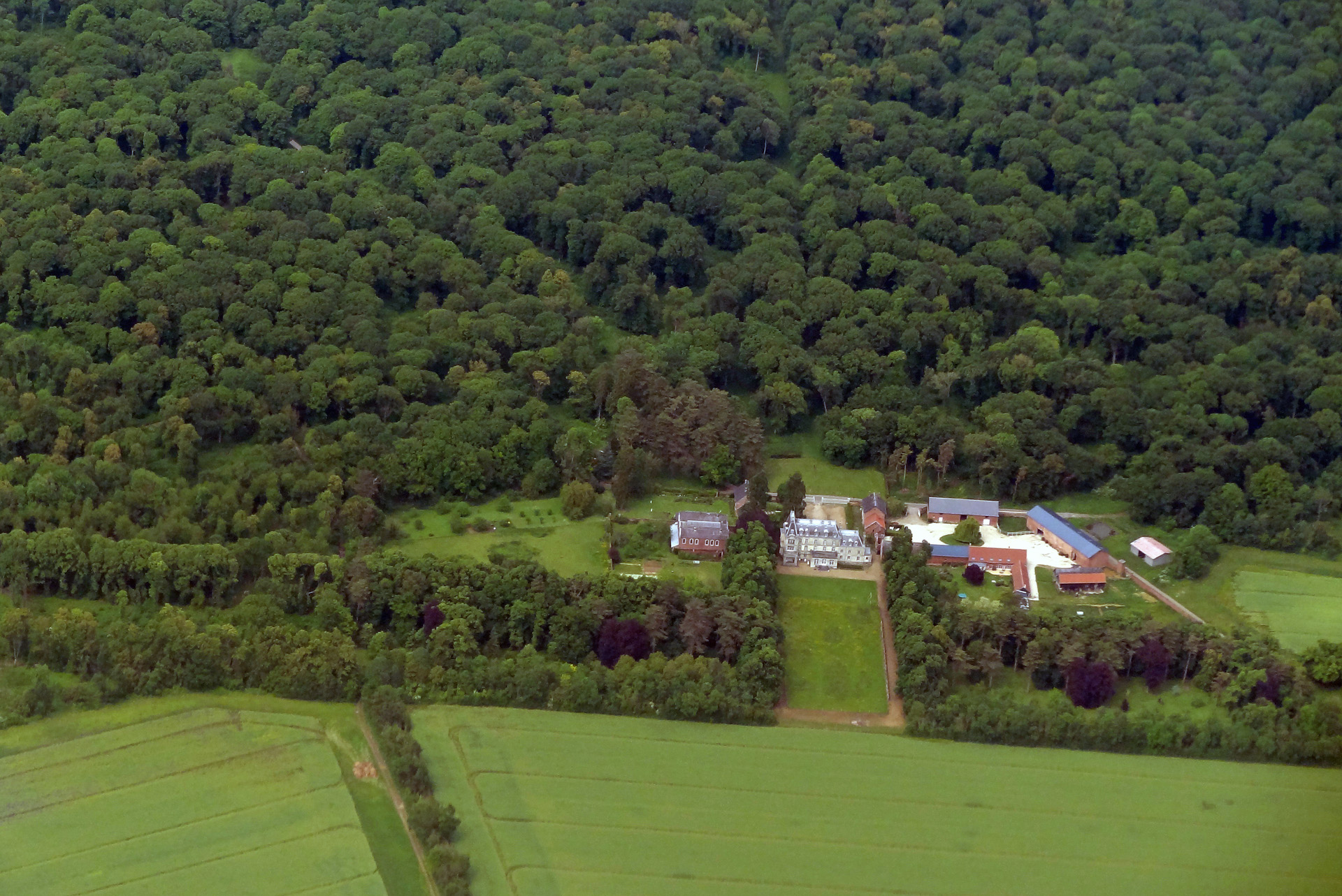 Vue aérienne du château de la Borde, Sains-Morainvillers (Oise), France.